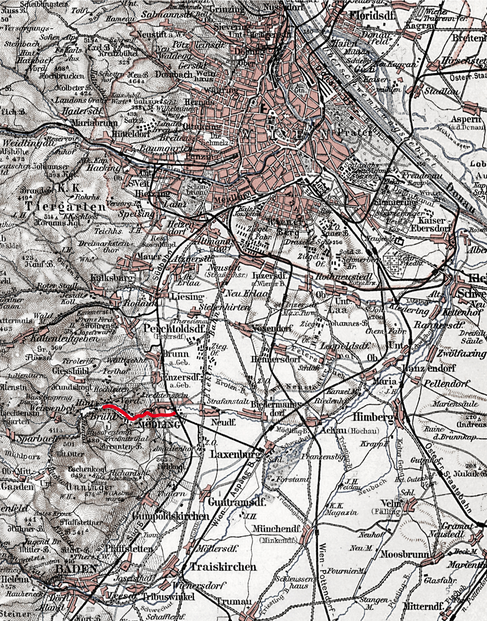 Ausschnitt aus Plan der Umgebung von Wien, Maßstab 1:225.000, Symbolstrecke Lokalbahn Mödling–Hinterbrühl